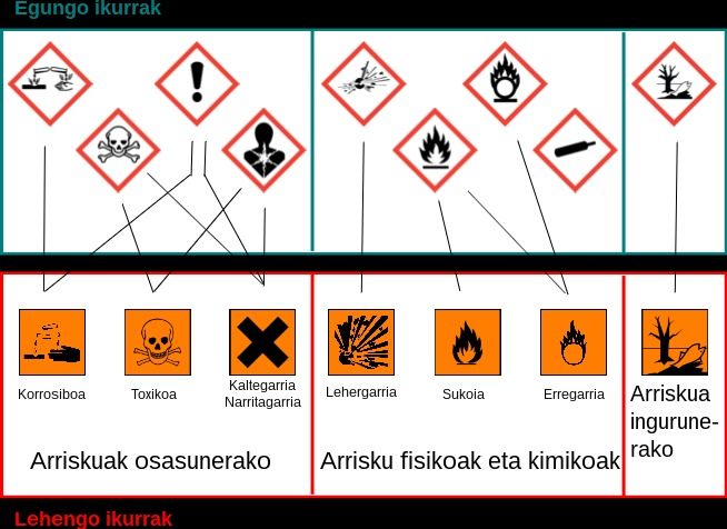 Egungo eta lehengo arrisku piktogramen arteko erlazioa